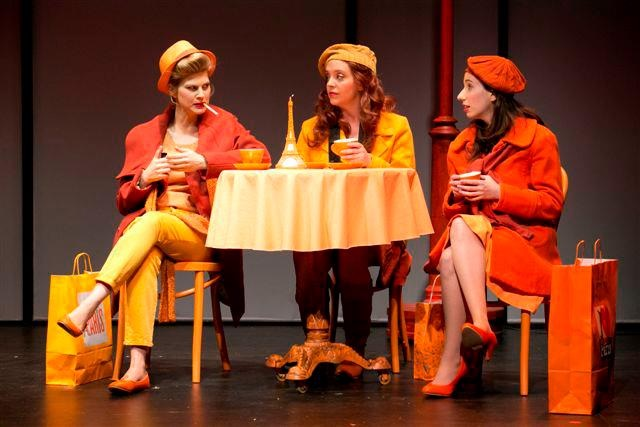 החברות הכי טובות, בית ליסין